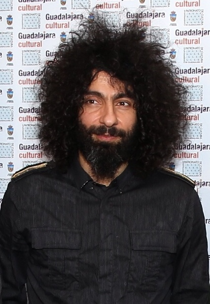 Cospedal asiste al concierto de Ara Malikian y Fernando Egozcue celebrado con motivo de la reapertura del Teatro Moderno de Guadalajara La presidenta de Castilla-La Mancha, María Dolores Cospedal, ha asistido al concierto que han ofrecido Ara Malikian y Fernando Egozcue con motivo de la reapertura del Teatro Moderno de Guadalajara.